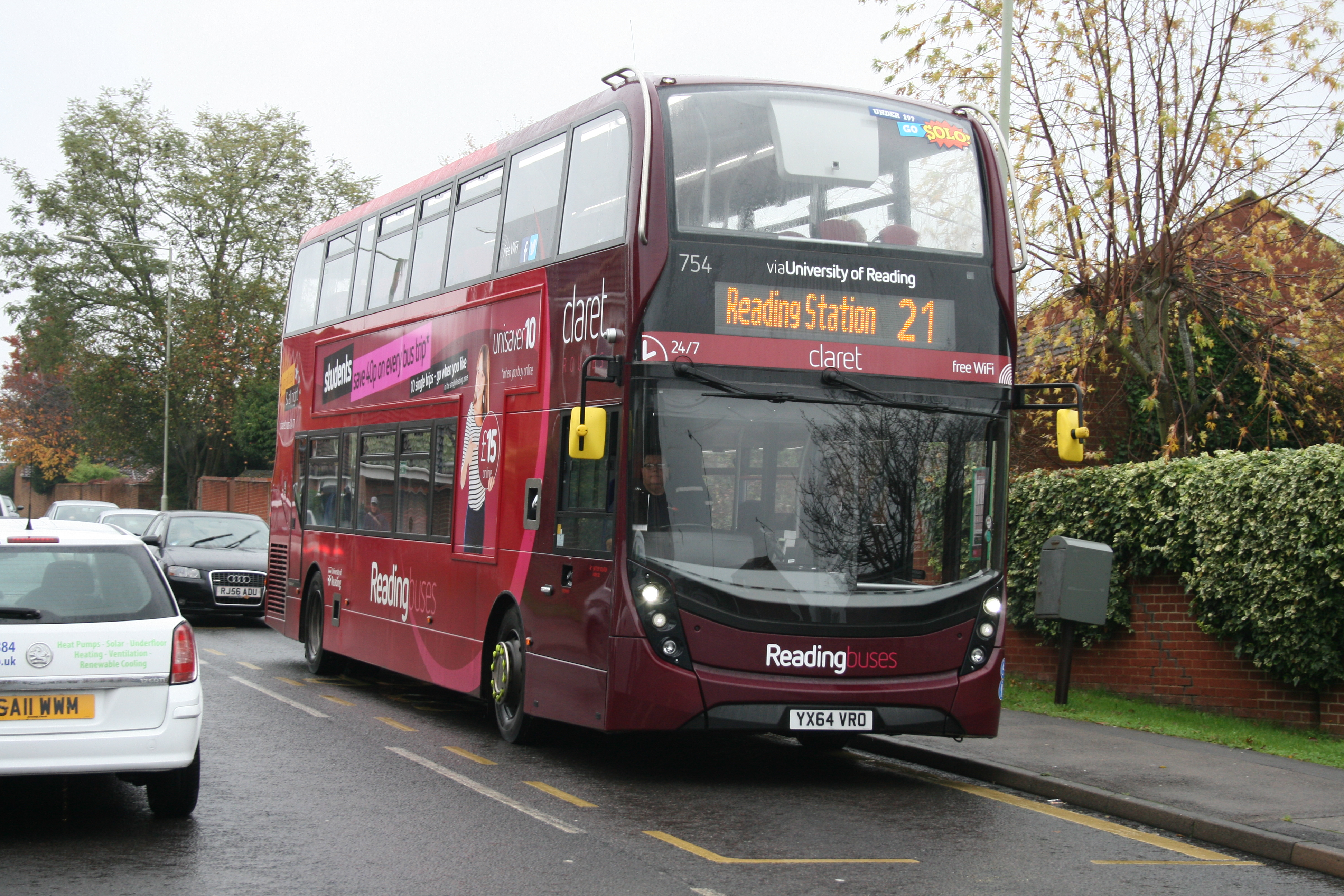 YX64 VRO